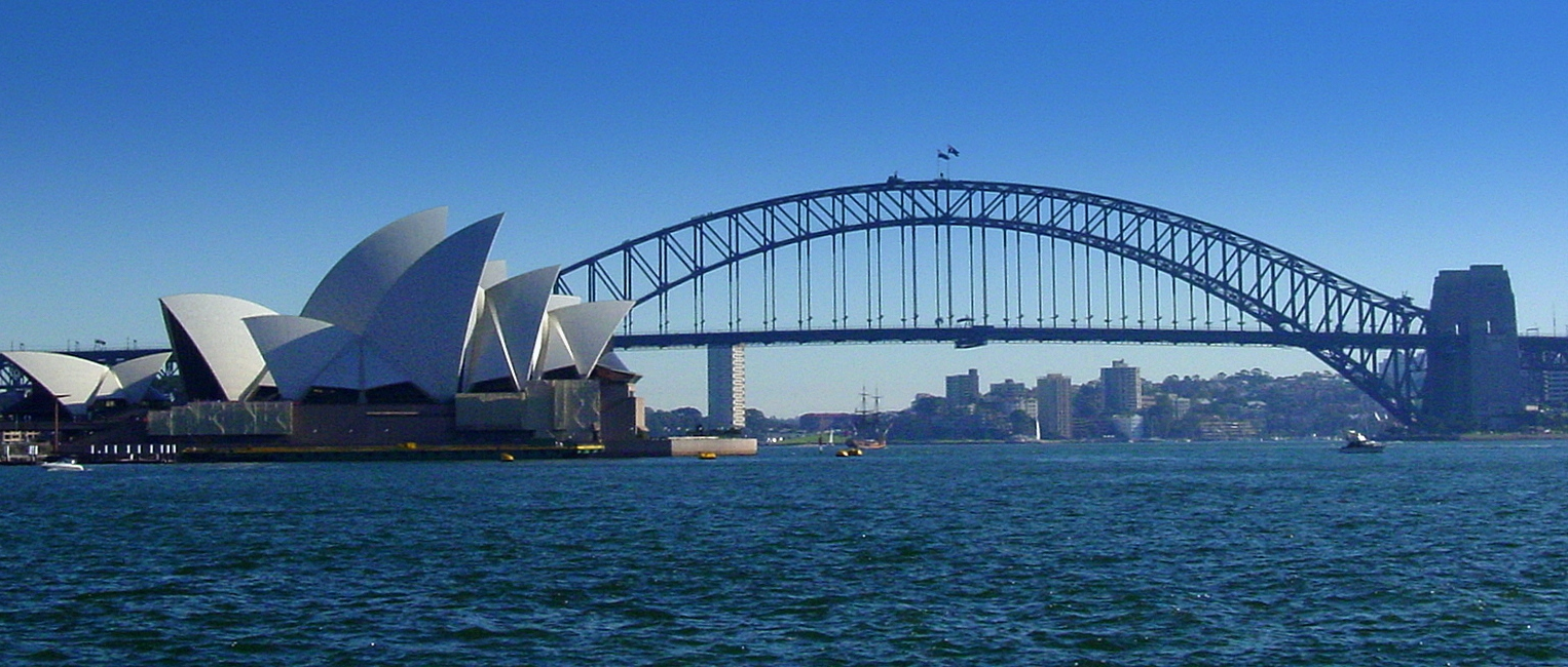 Australia 2003 059